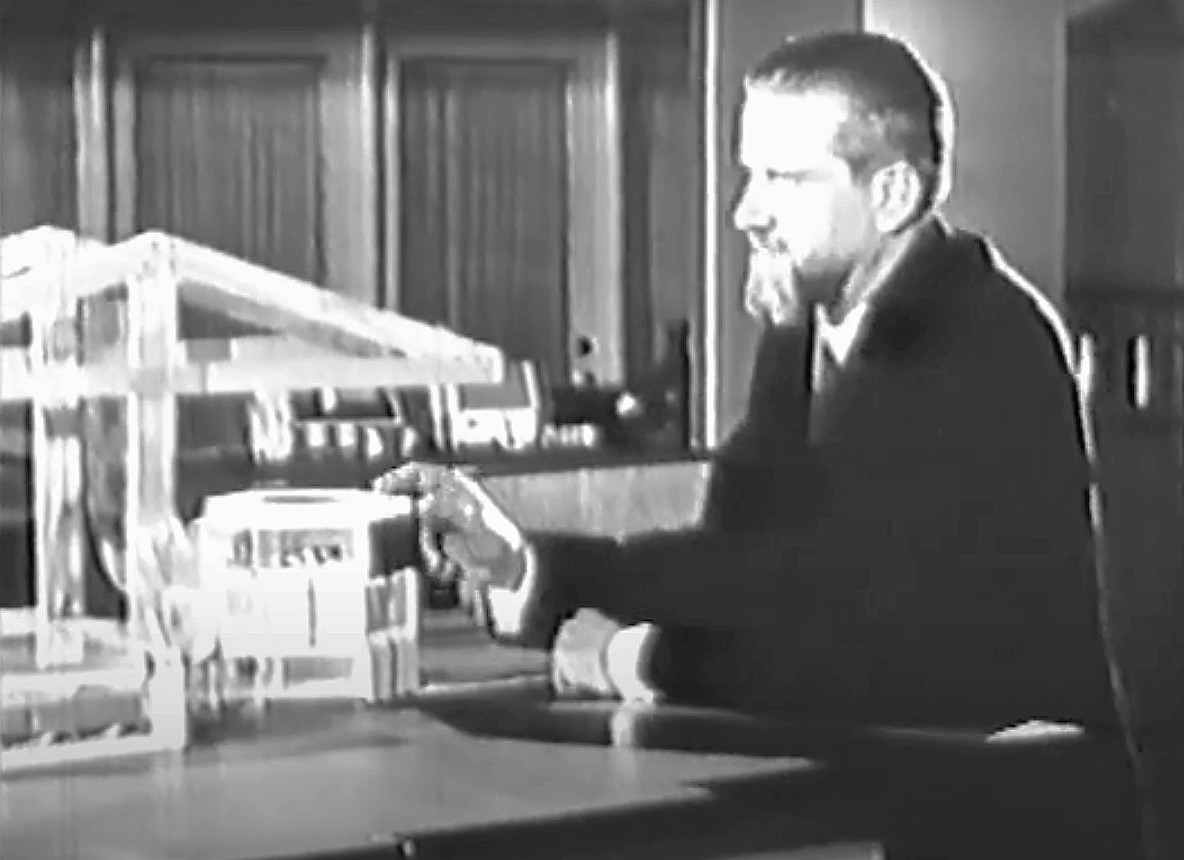 Lars Magnus Giertz förklarar ventilationssystemet på Östbergas nya bostäder i Kvarteret Stamtavlan